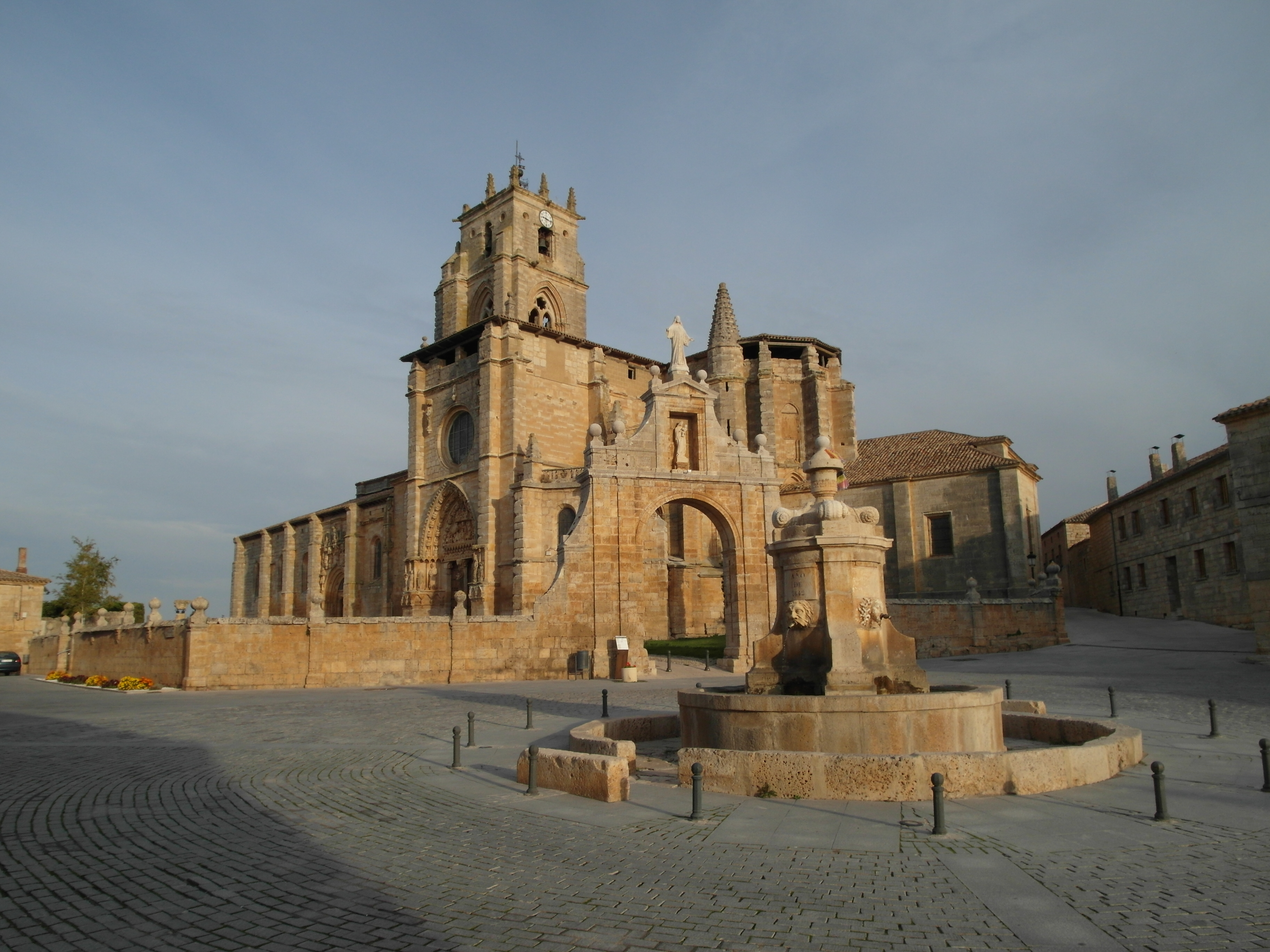 Sasamón, Burgos.